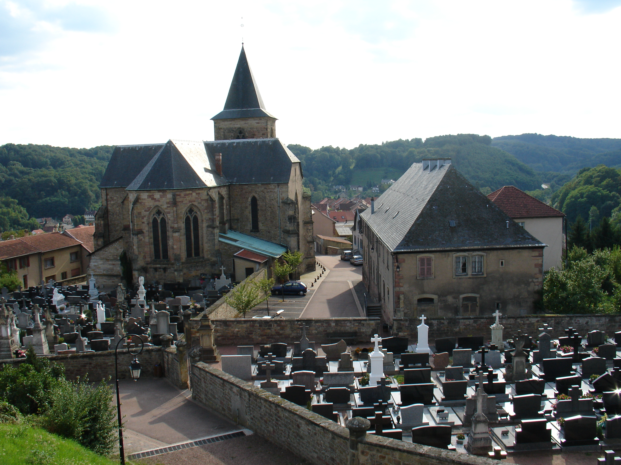 Arrière de l'Église collégiale Saint-Étienne de Hombourg-Haut avec son cimetière (située dans le Vieux-Hombourg) vue du haut des vestiges du château.